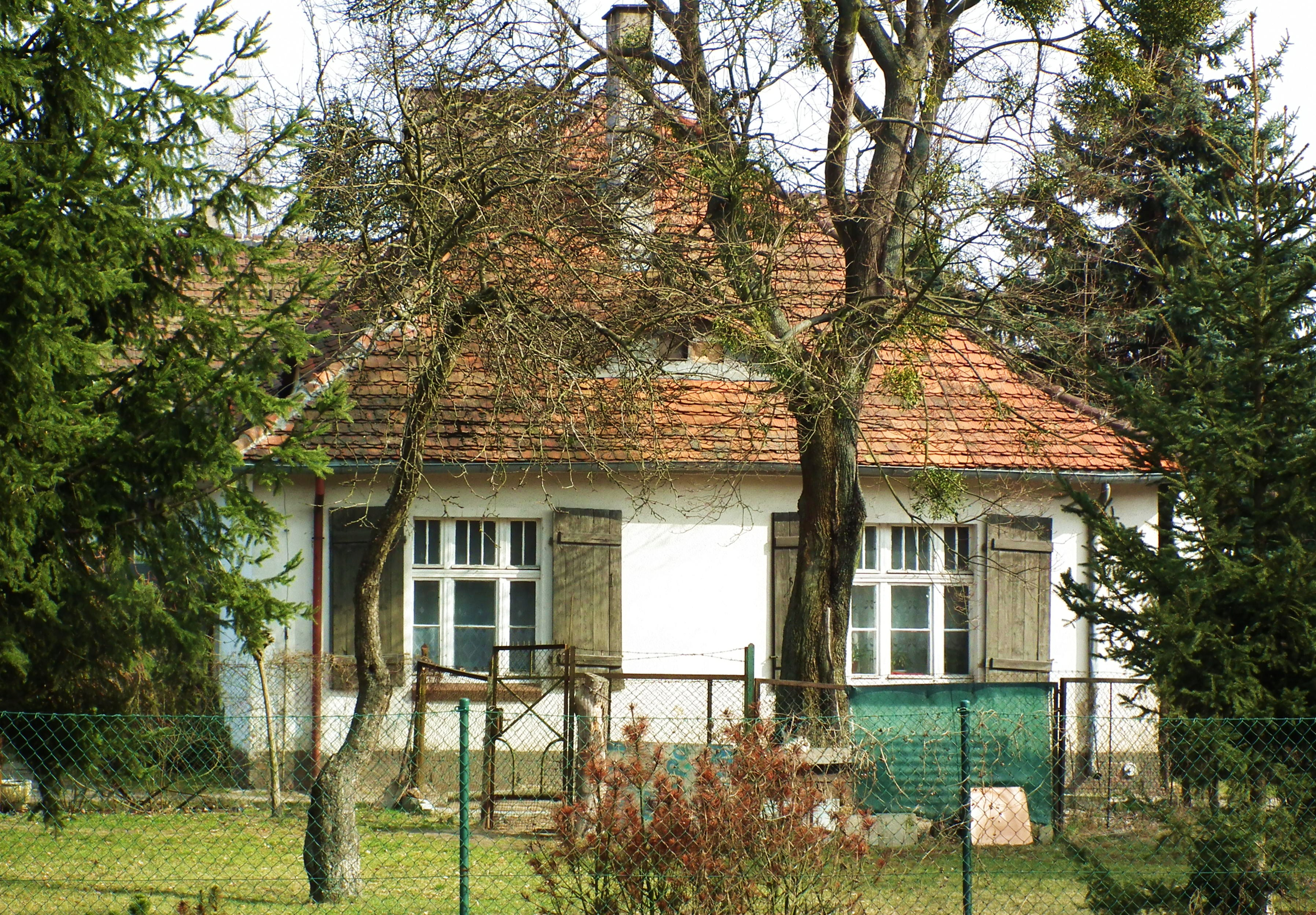 Stara szkoła przy ul. Biskupińskiej, Poznań - Strzeszyn.